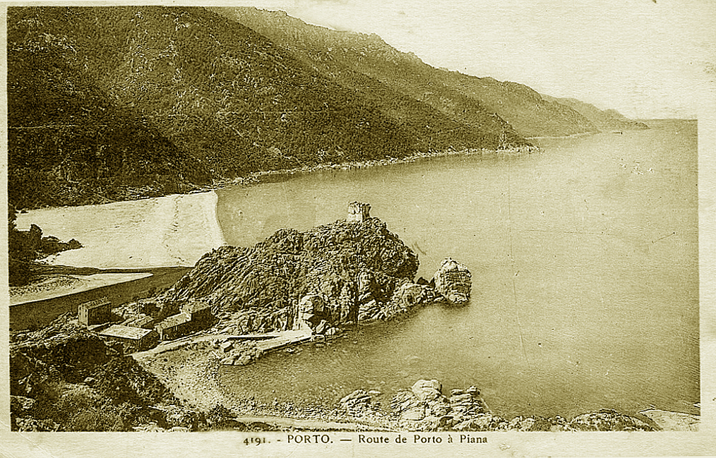 Route surplombant la marina de Porto au début du XXe siècle